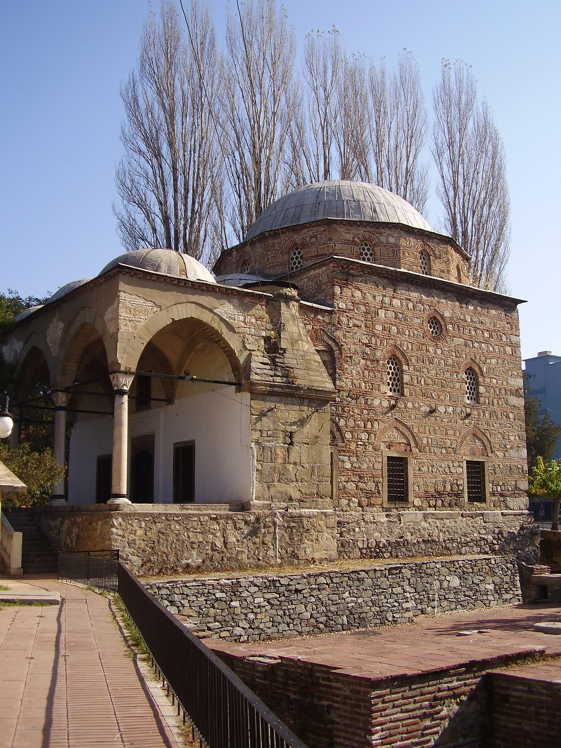 Джамия "Ахмед Бей" - гр.Кюстендил